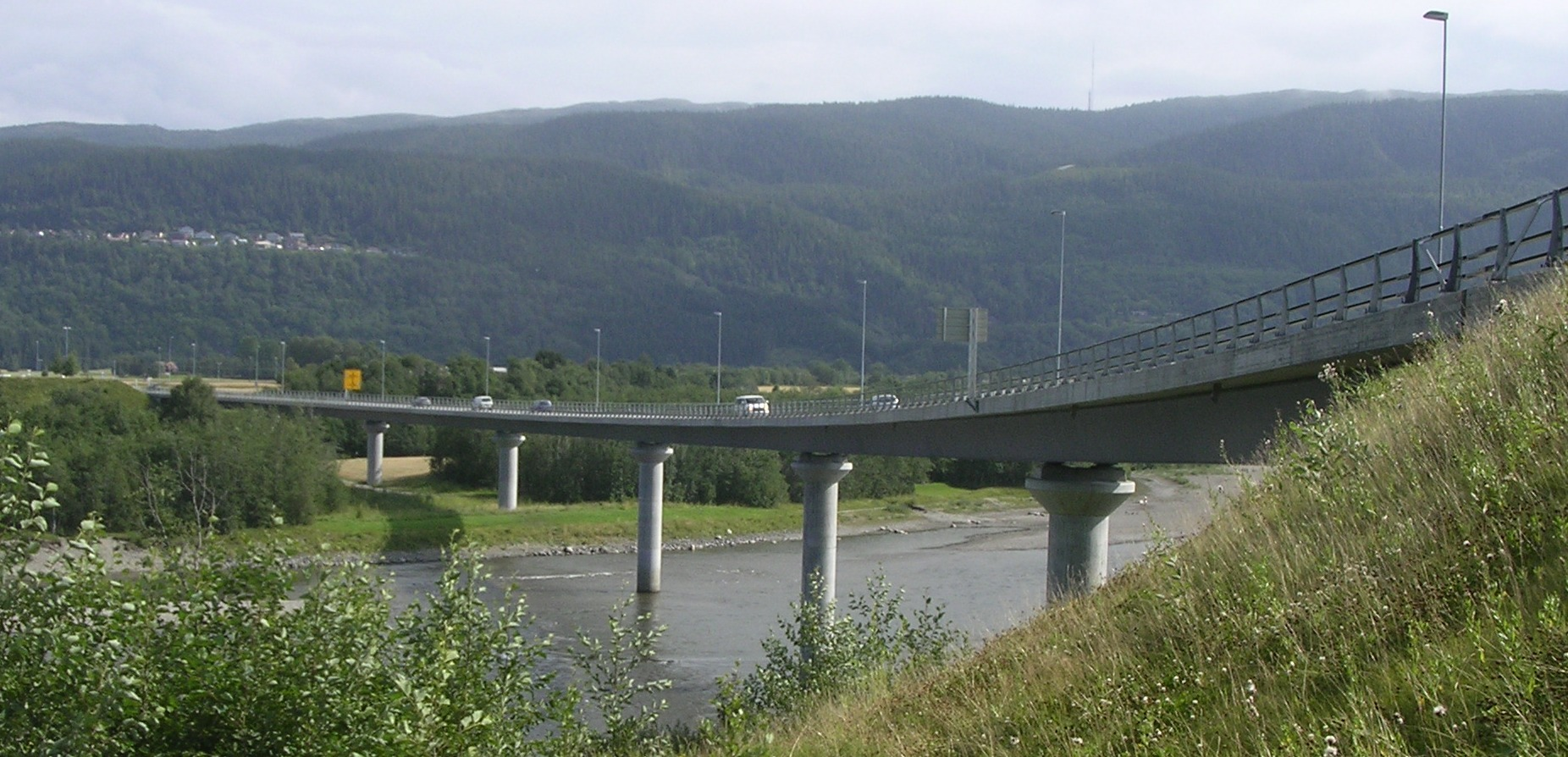 Melhusbrua i Melhus kommune, Sør-Trøndelag